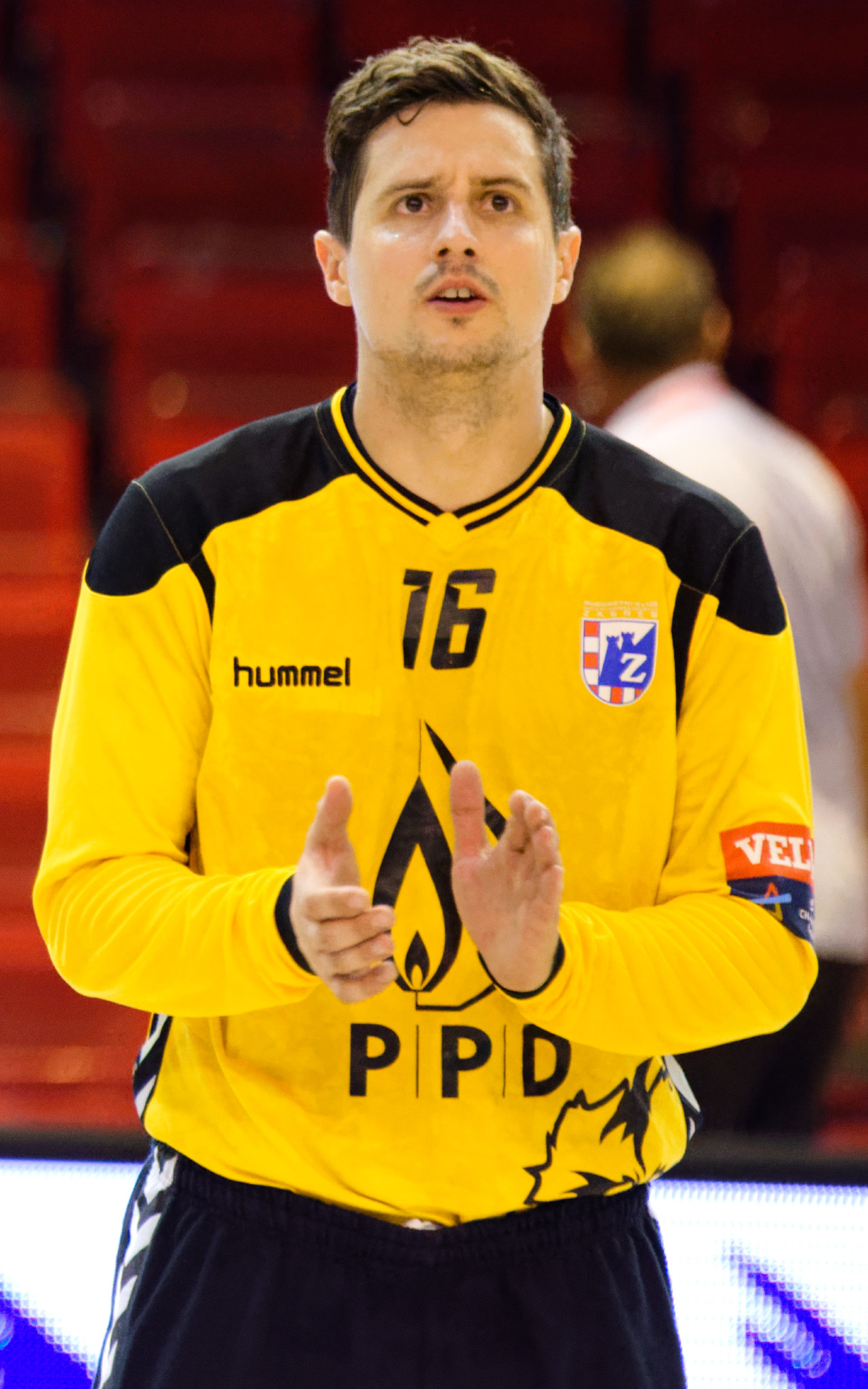 Rencontre du challenge Marrane 2016 entre l'US Dunkerque et les croates du RK Zagreb